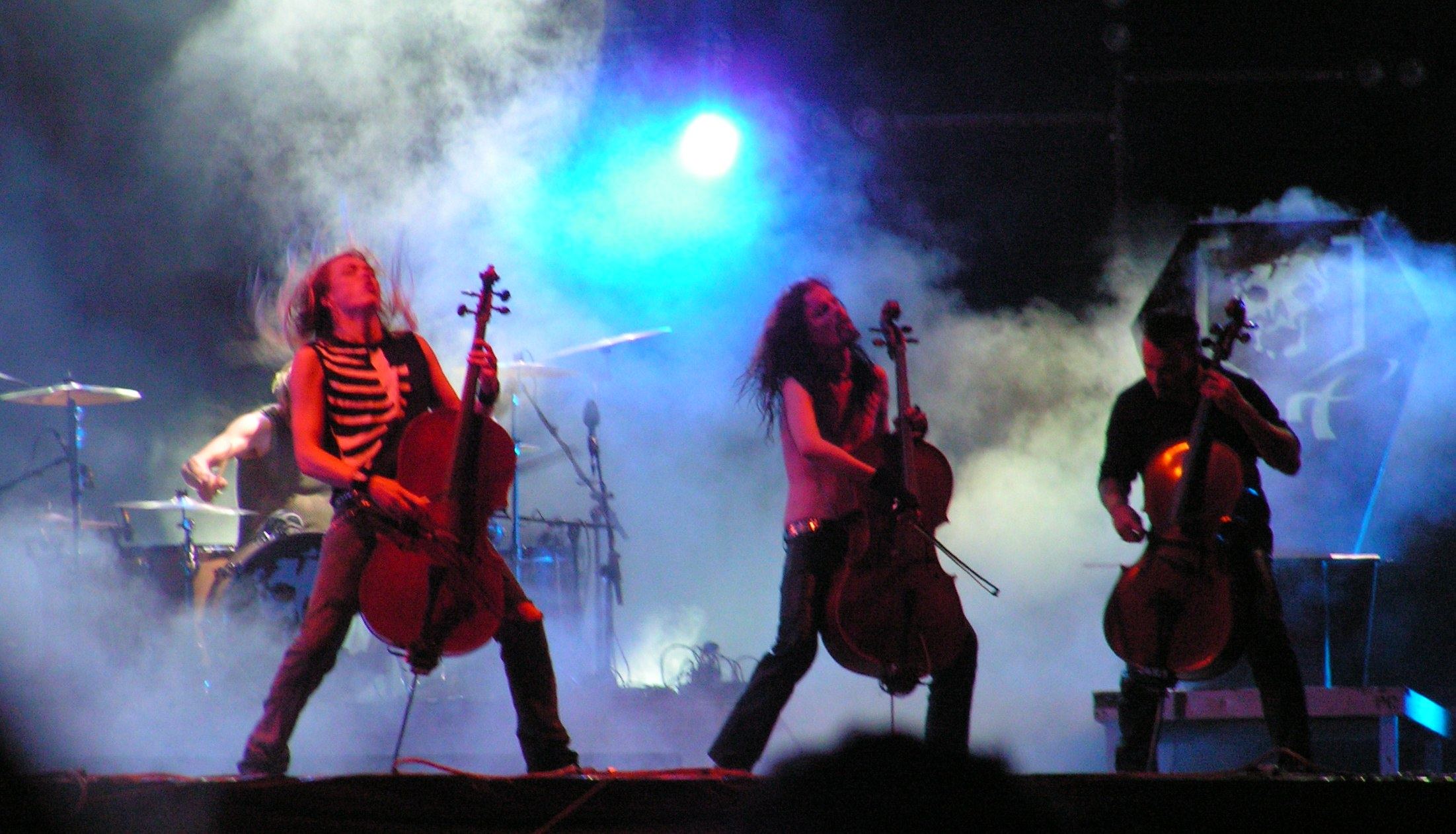 Foto presa al concerto degli Apocalyptica al Festival Wacken Open Air 2005. Foto personale. Wacken, agosto 2005.